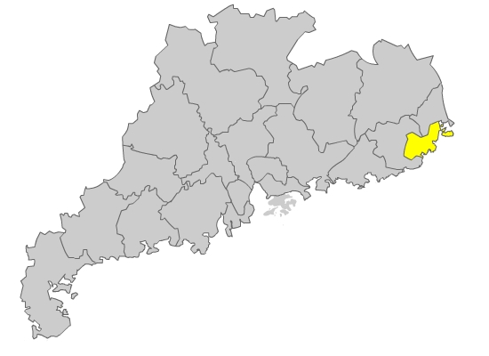 内容介绍：汕头在广东的位置 原创者：zhuwq 创作日期：2005年1月 创作方法：将广东地图用扫描仪输入电脑，再将图片导入FLASH，用画笔描出轮廓，着填充，导出JPG图像。 zhuwq授权，任何人都可以使用